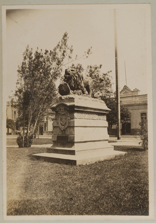 León Suizo. Estatua donada por la colonia suiza en el centenario de la independencia de Chile (1810).